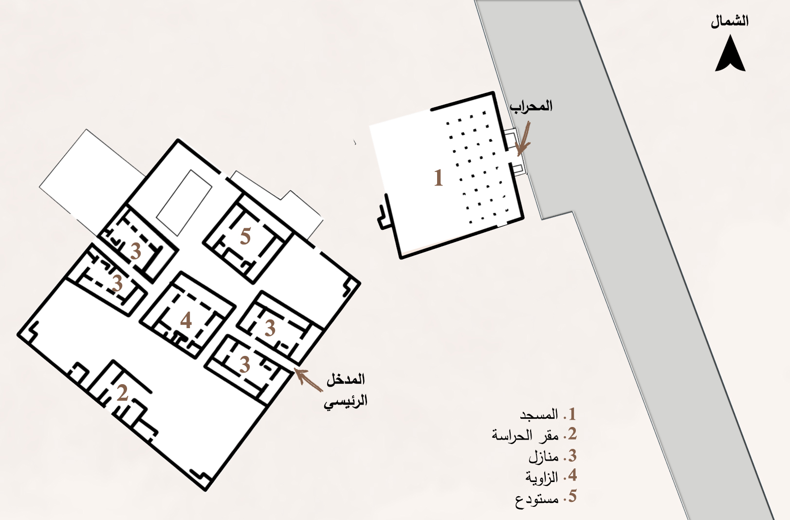 رسم تقريبي للتصميم المعماري لزاوية و مسجد الشيخ ماء العينين بالسمارة، المغرب